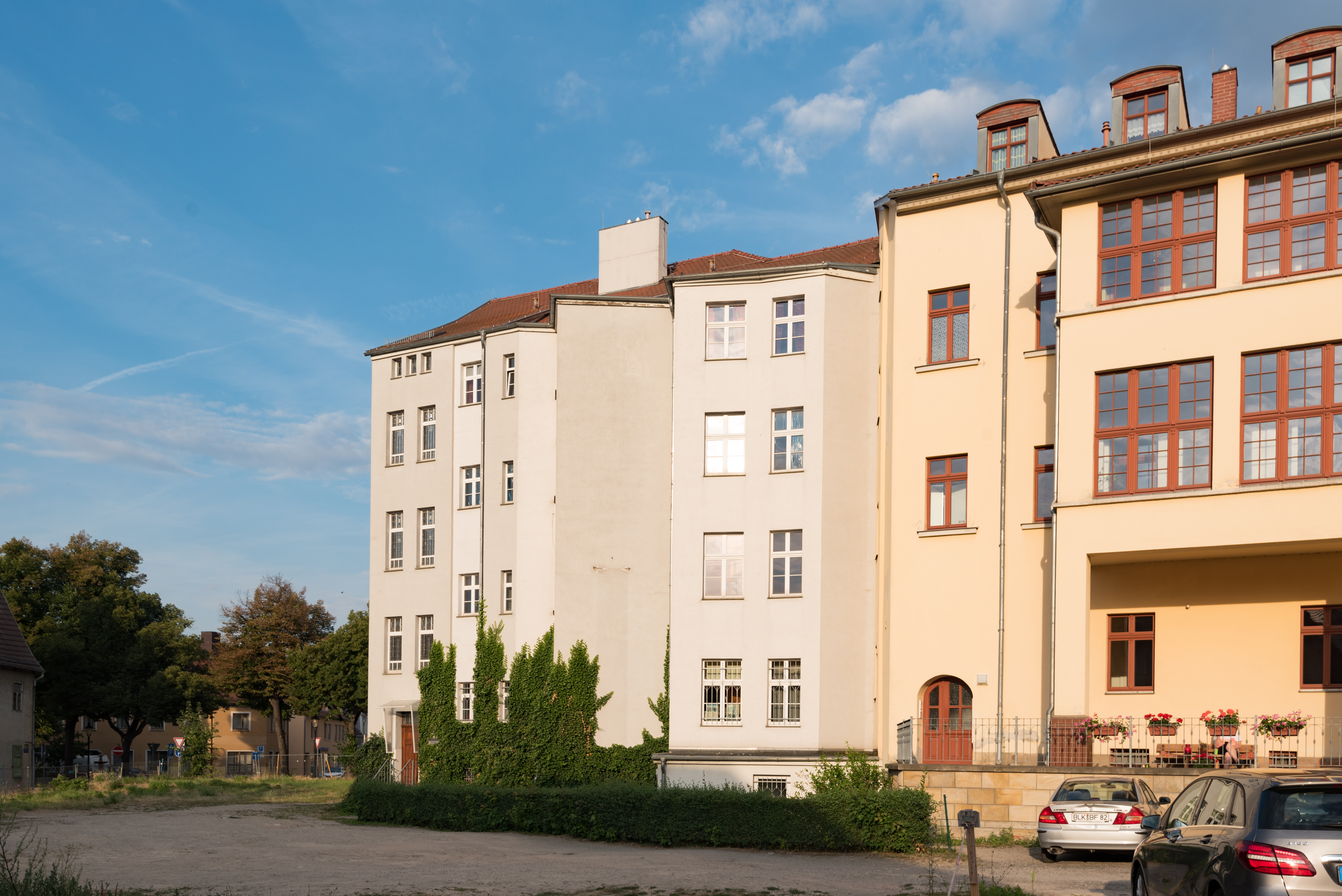 Naumburg (Saale), Lindenring 47b, von Westen